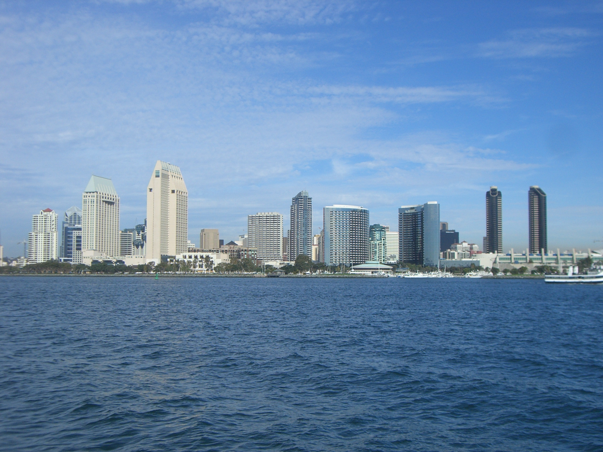 San Diego Skyline